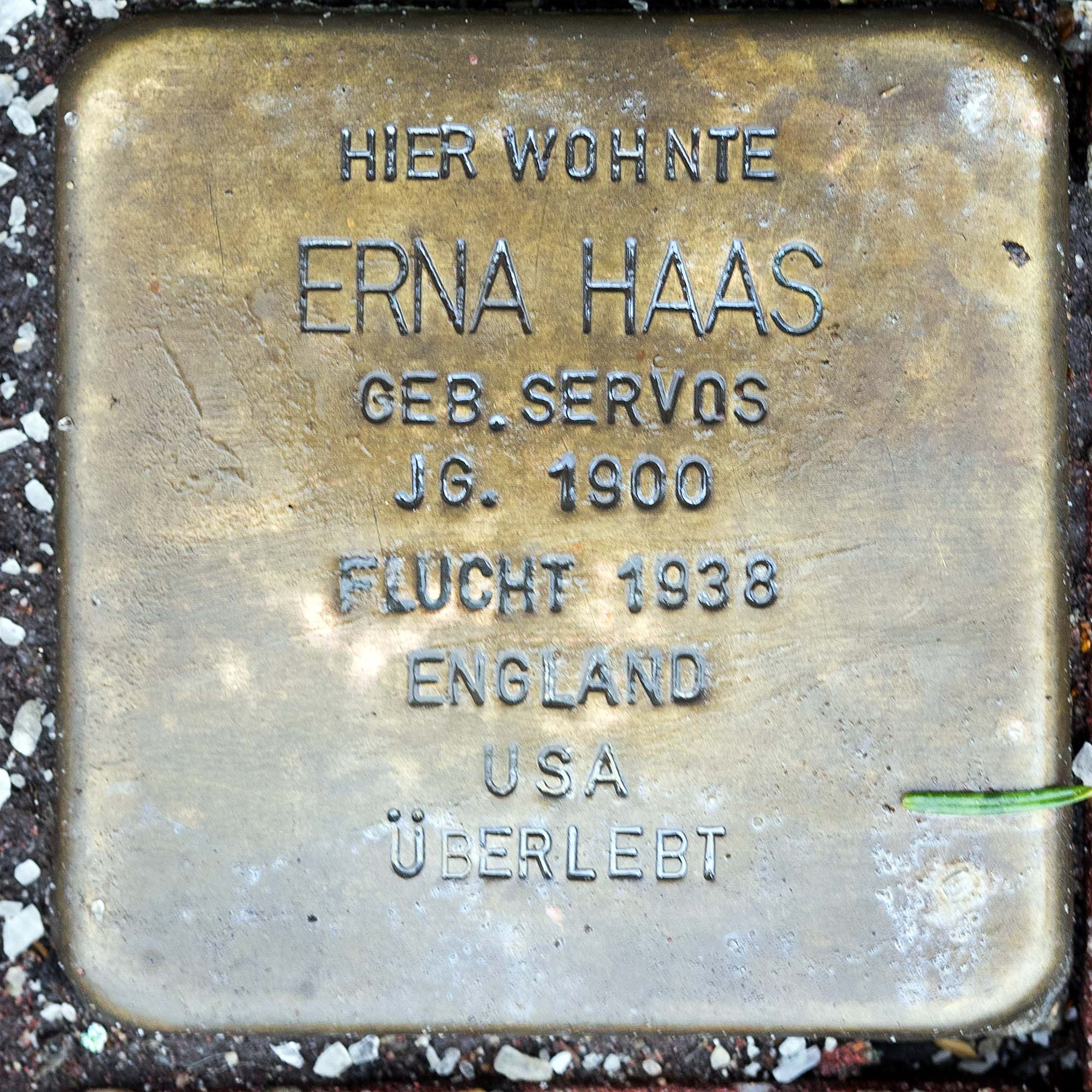 Stolperstein für Haas Erna